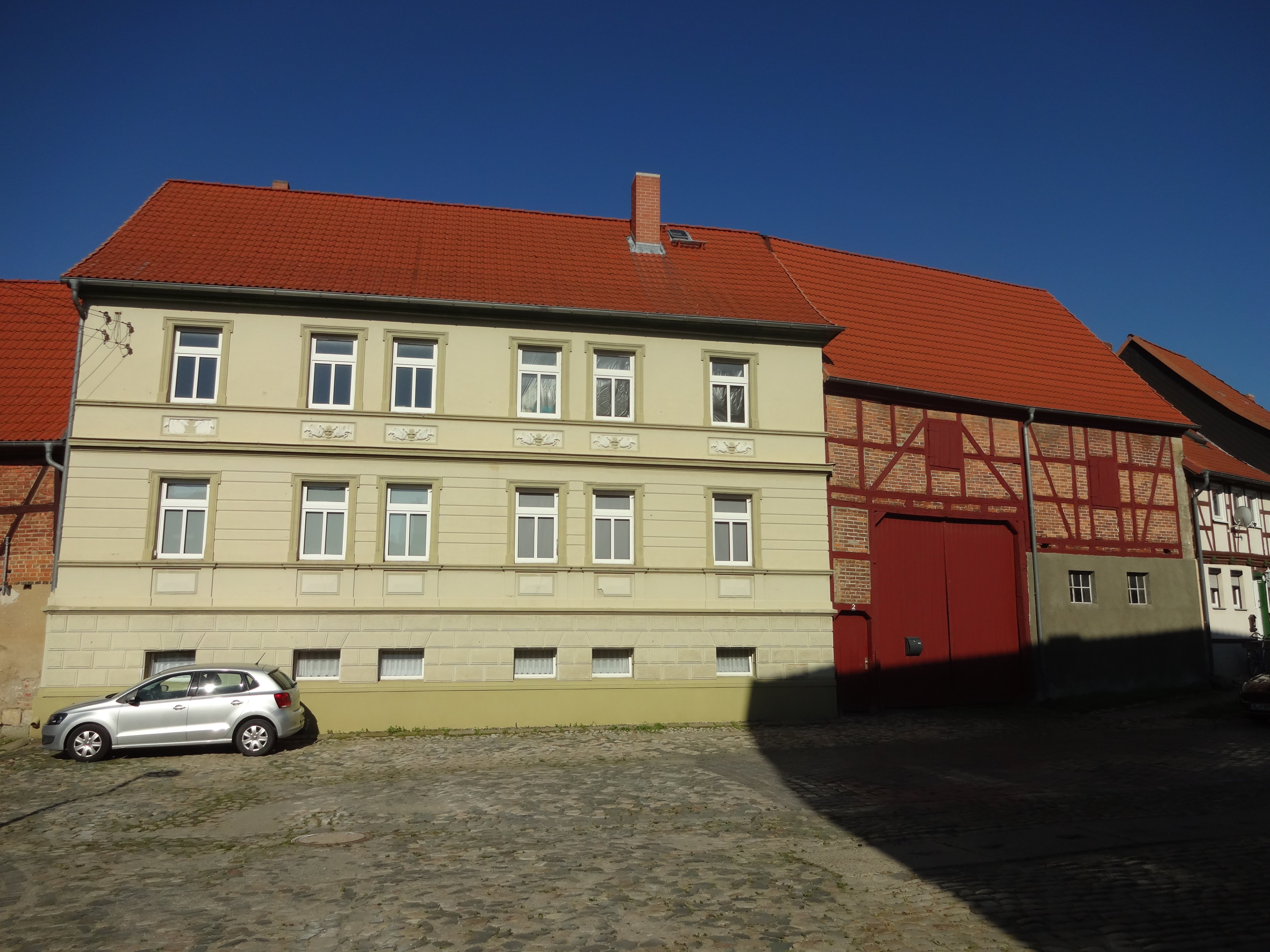 denkmalgeschütztes Bauernhaus in der Amtsstraße 2 in Harsleben